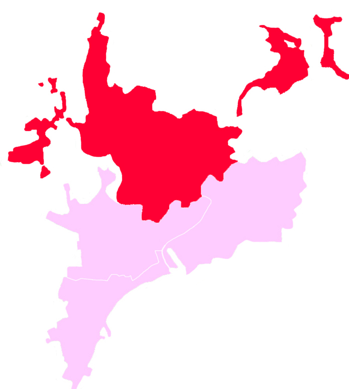 Ilyichevsky_mar